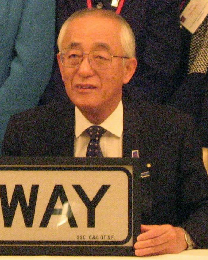 Mayor of Osaka Junnichi Seki(關淳一).